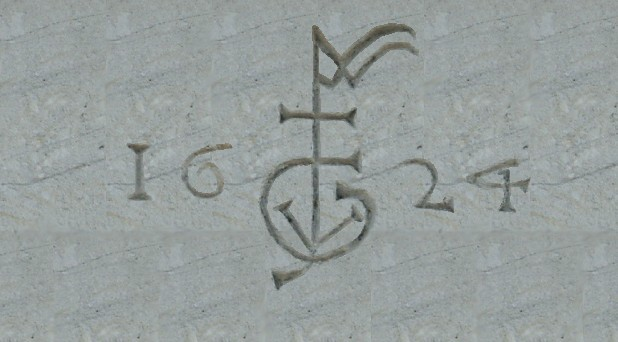 Marque de Jean Guy, Prévôt de la Confrérie des Marchand d'Outre-Mer en 1622